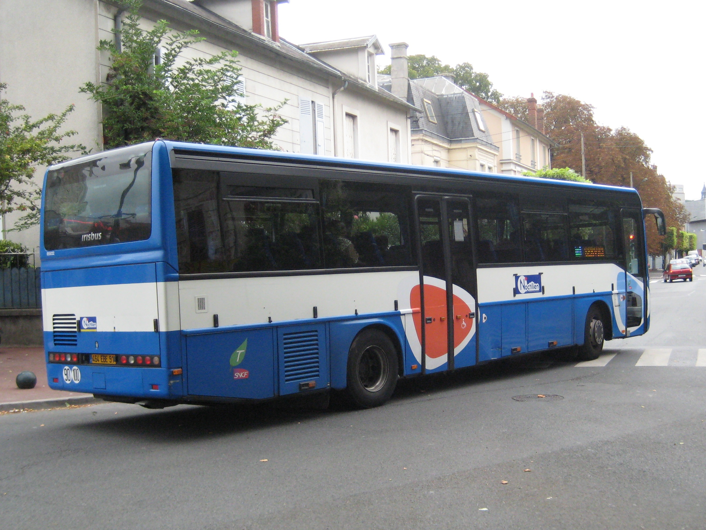 Car Noctilien (Transilien) assurant la liaison Corbeil-Essonnes - La Ferté-Alais en août 2010. Corbeil-Essonnes. Essonne. France.